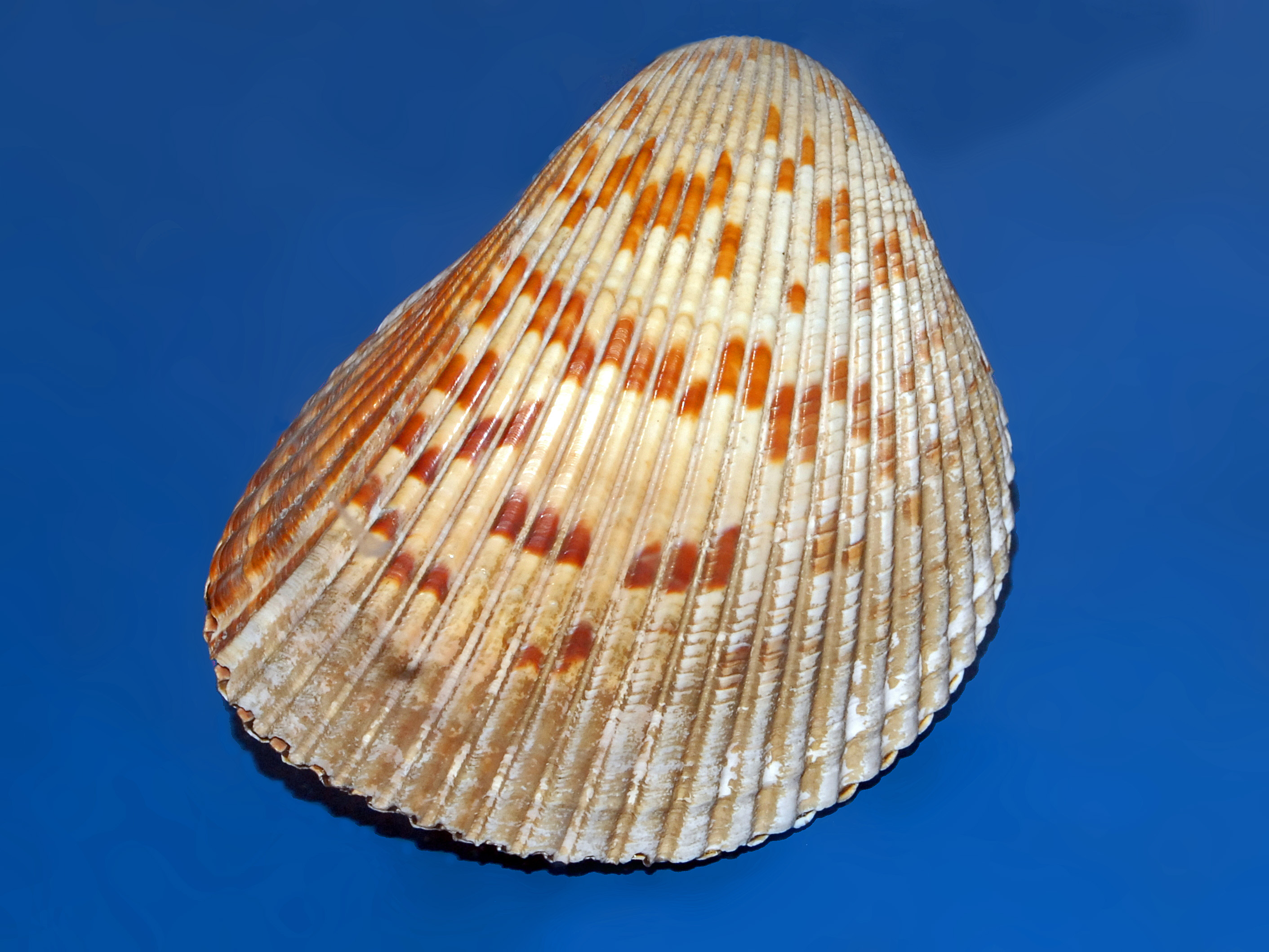 Shell of Dinocardium robustum from Florida at the Museo Civico di Storia Naturale di Milano